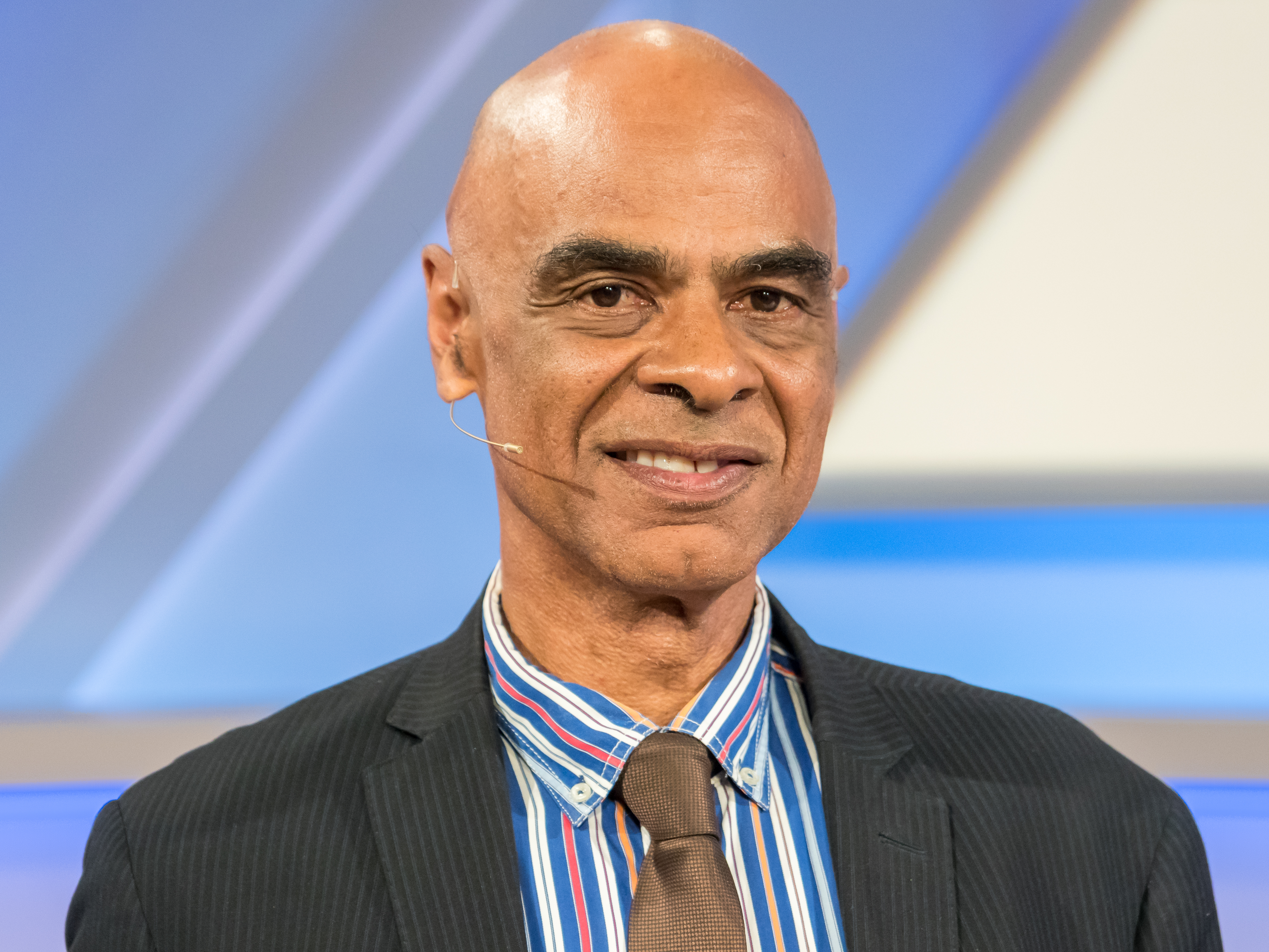 MAISCHBERGER am 14. August 2019 in Köln. Produziert vom WDR. Sommerstaffel „maischberger. die woche“ Foto: Charles M. Huber, Schauspieler und ehemaliger CDU-Bundestagsabgeordneter